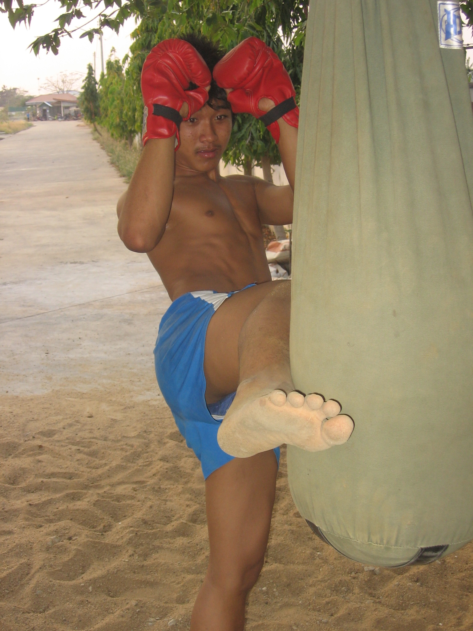 Albeiro Rodas (Albeiror24, wikipedista), fotografía tomada en febrero de 2006 en Poipet, Camboya.